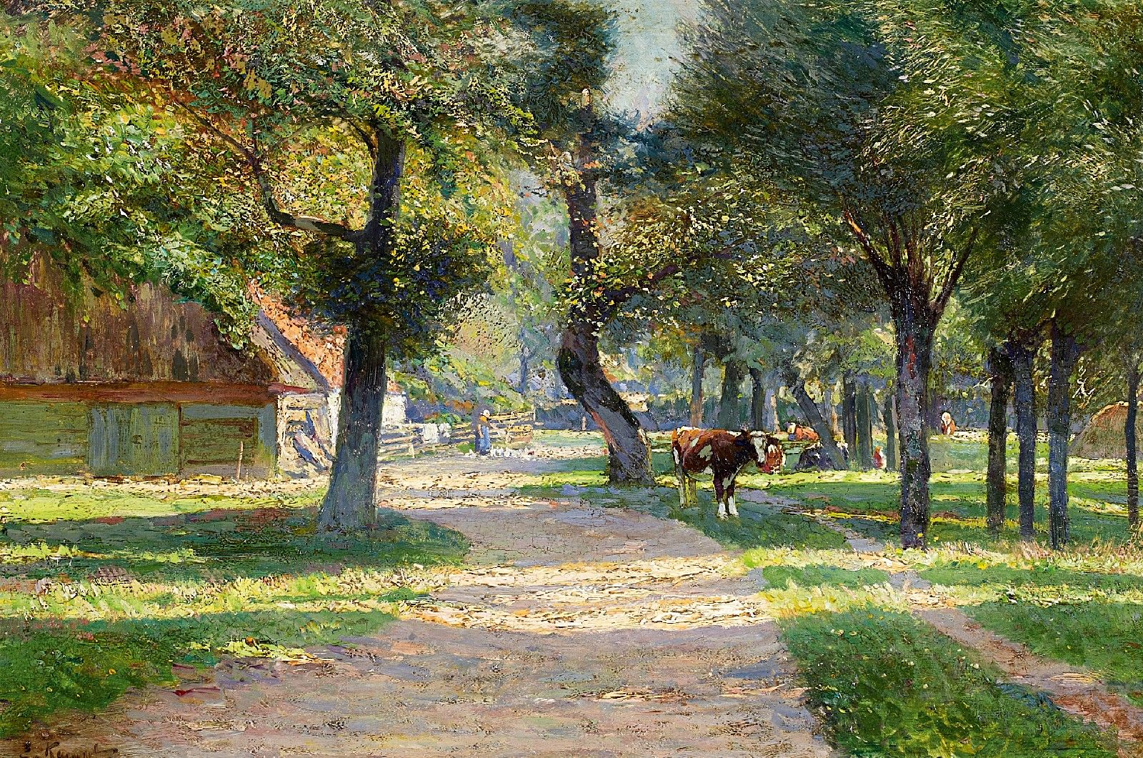 Sommerliche Dorflandschaft. Signiert unten links: E. Kampf. Öl auf Holz. 28 x 42 cm.